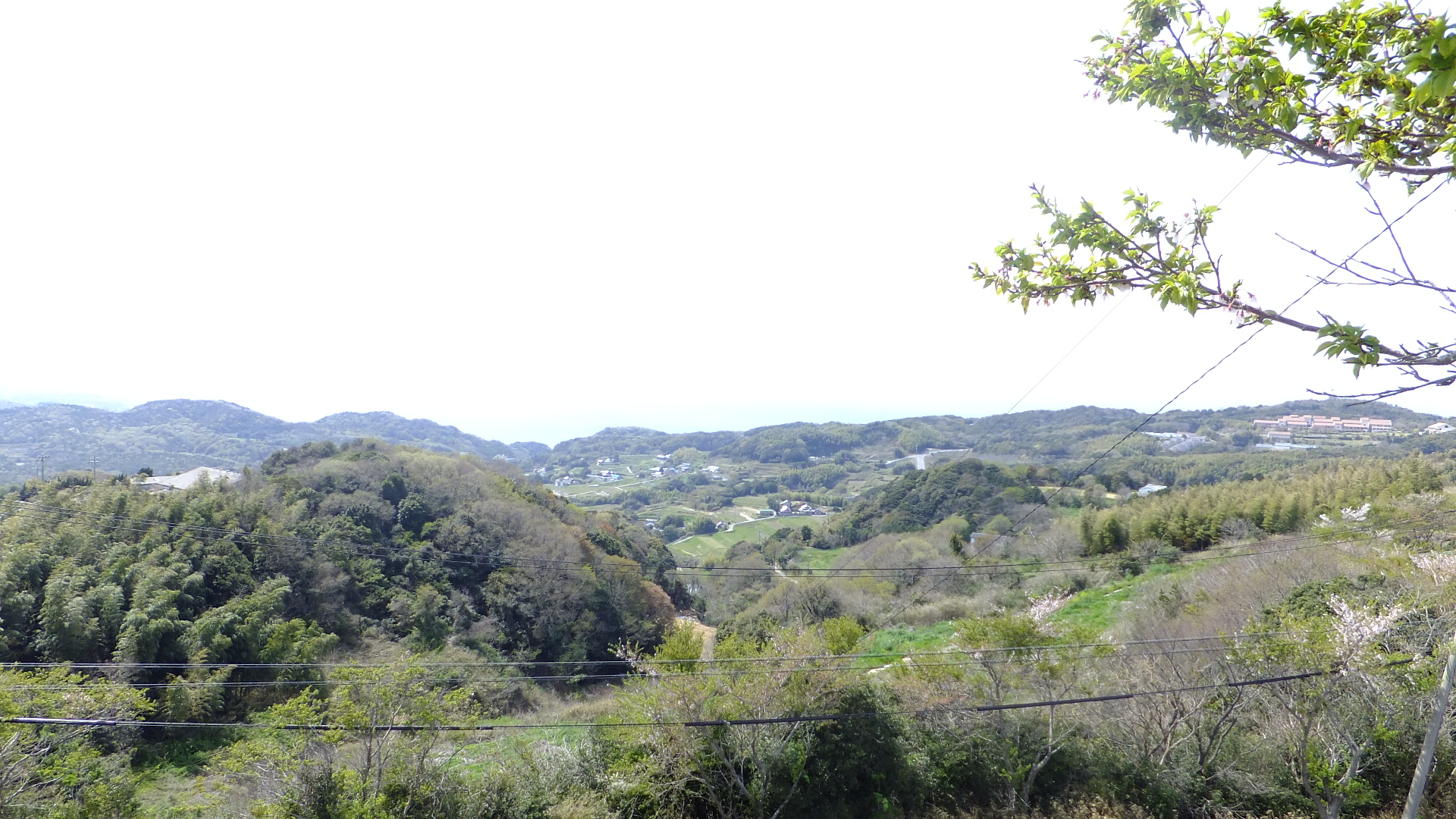 兵庫県淡路市中持